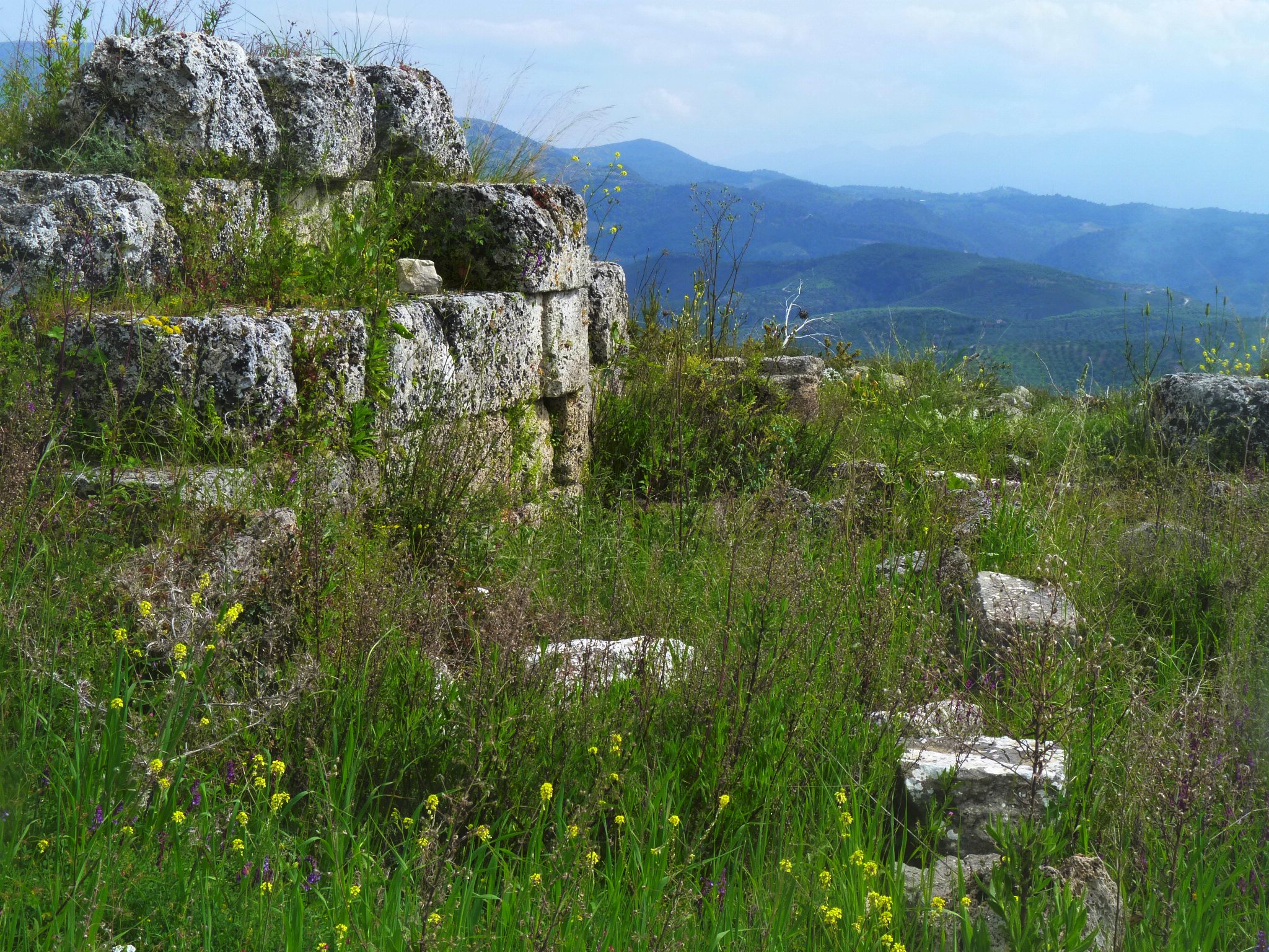 Ναός Δήμητρας, Λέπρεο